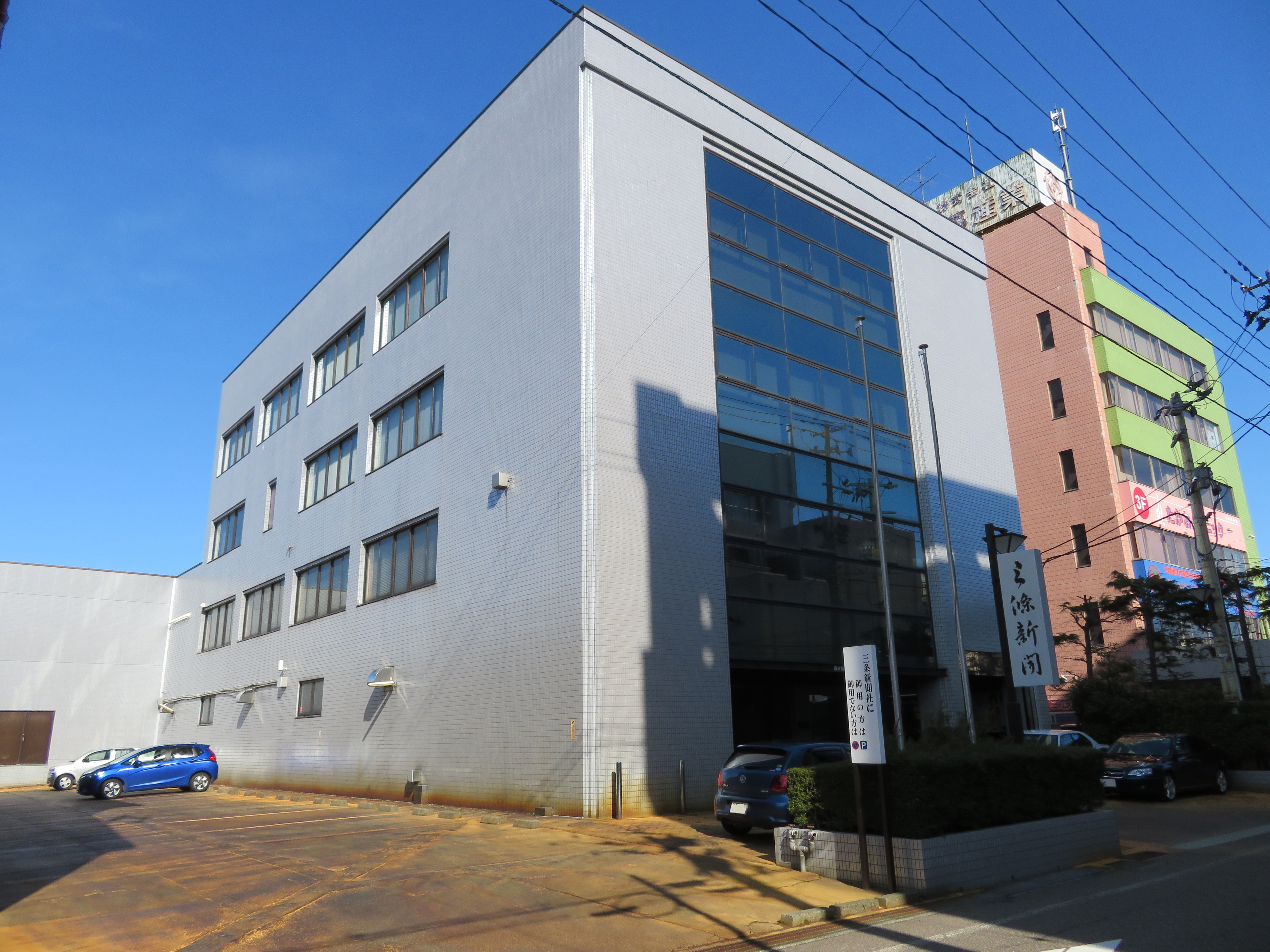 新潟県三条市にある三条新聞社社屋